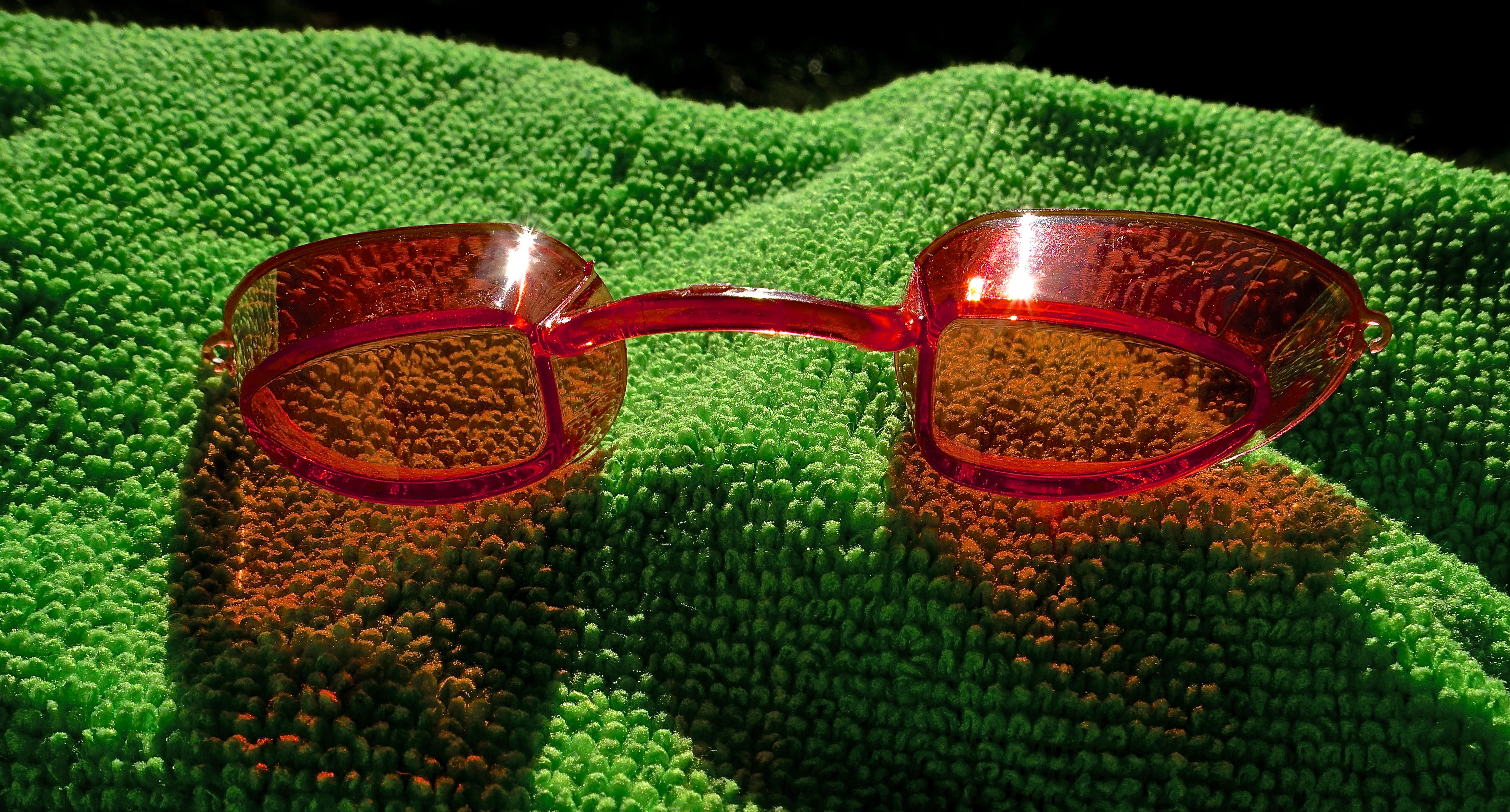 Goggles for indoor tanning